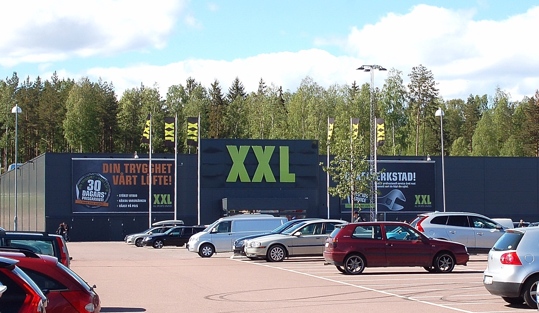 XXL Välsviken, Karlstad.